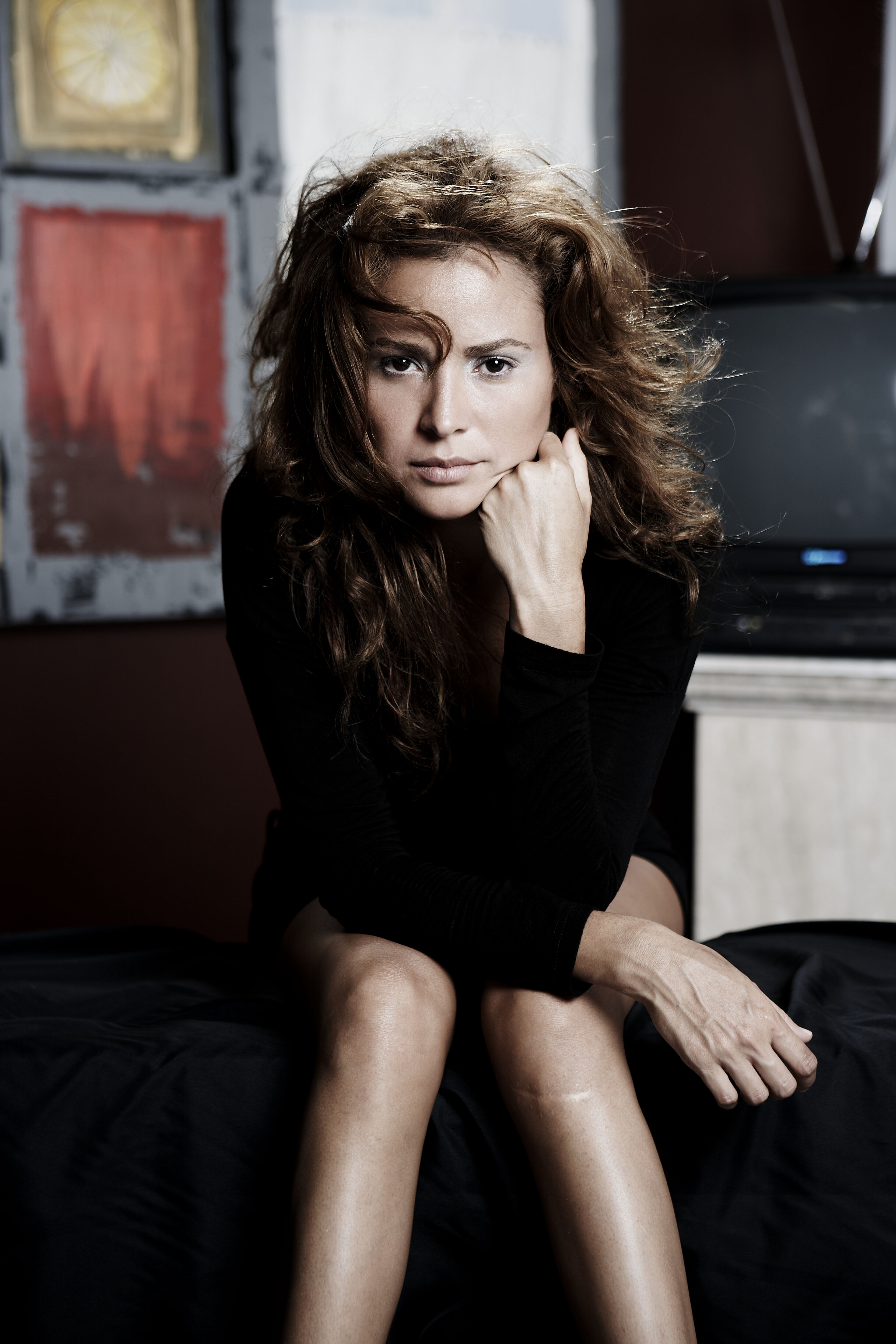 Sacha Nairobi. Cantante y compositora venezolana.